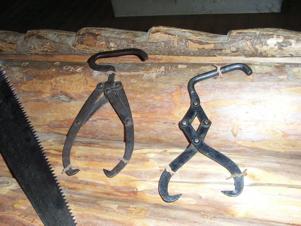 Tømmerklyper utstilt på Norsk skogmuseum på Elverum